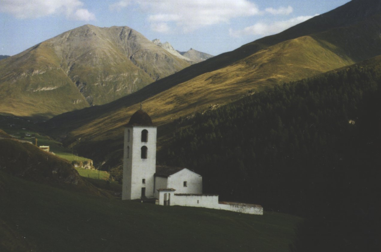 Kirche in Cresta, Avers